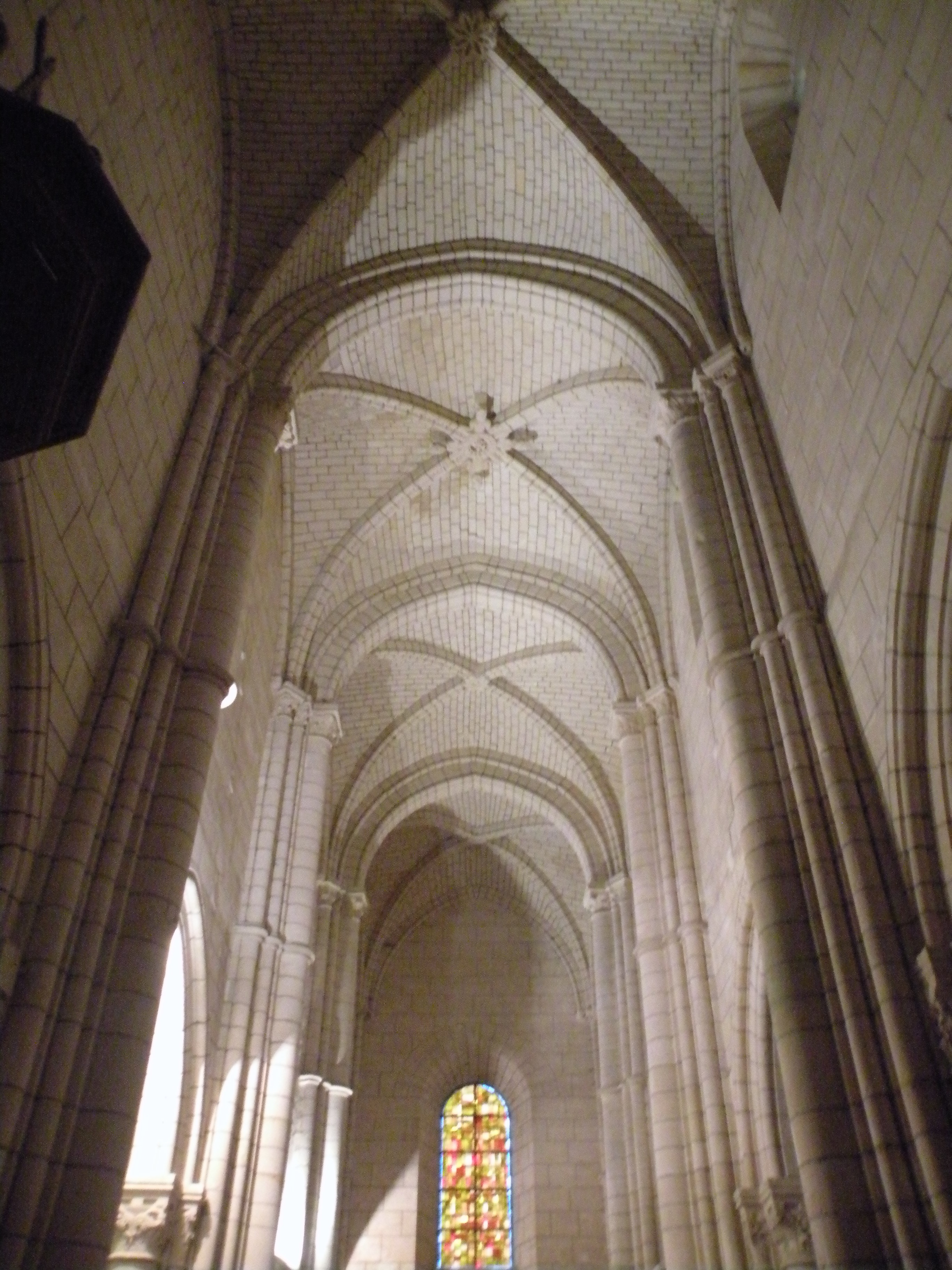 détail voute de la nef